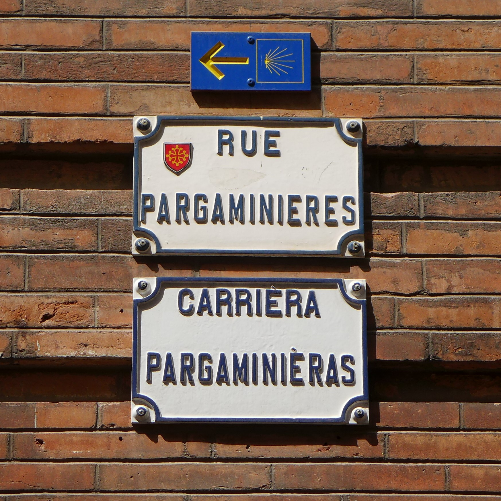 Rue Pargaminières - plaques de rue (Toulouse)